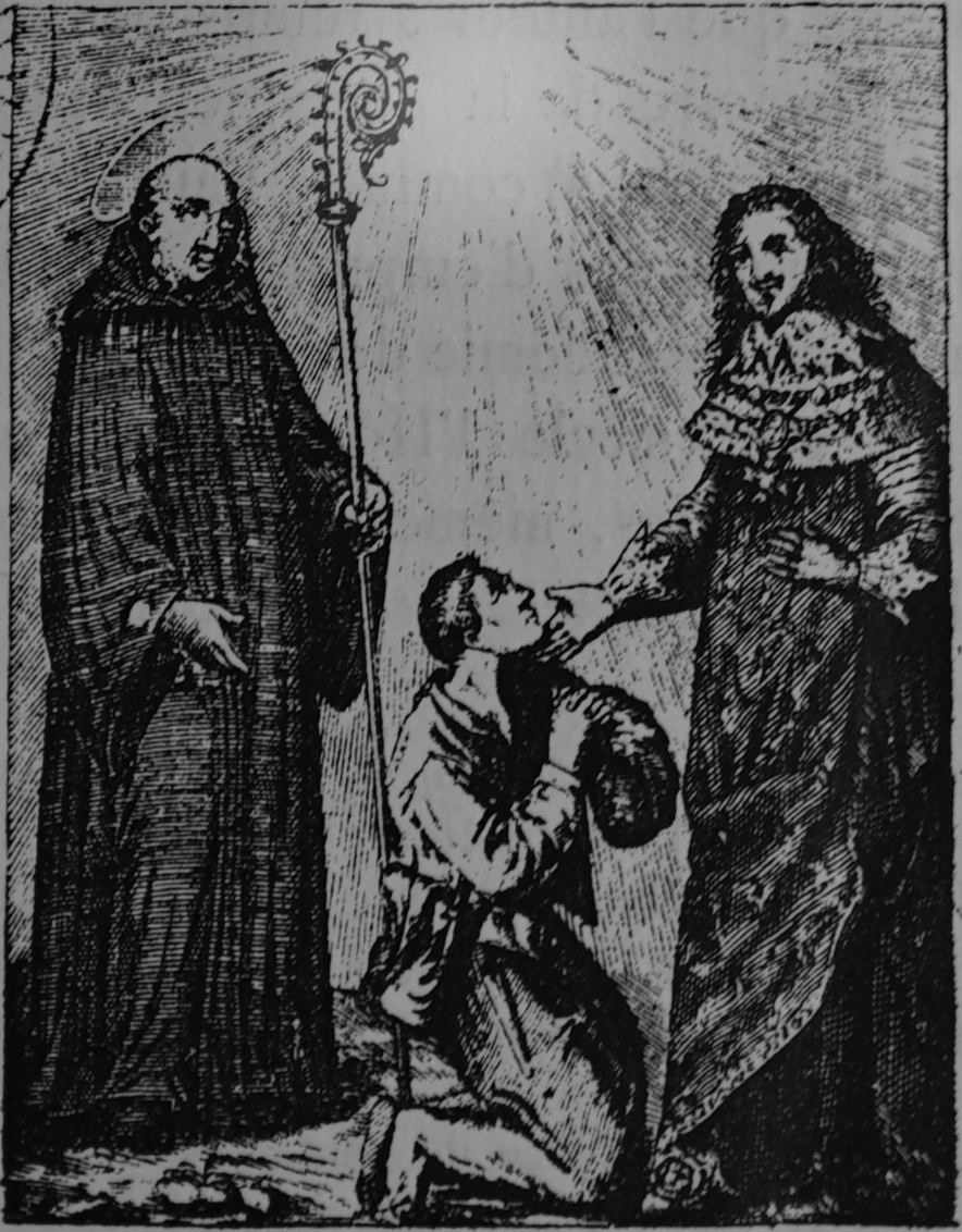 image in ː "Apologie pour le pélerinage de nos roy à Corbeny au tombeau de st-MArcoul" par l'abbé Nanteuil, 1638.